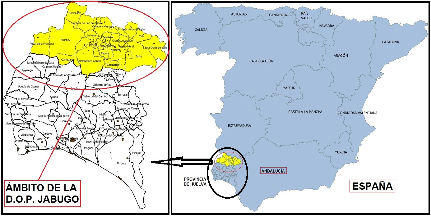 Mapa con las localización de la DOP Jabugo.